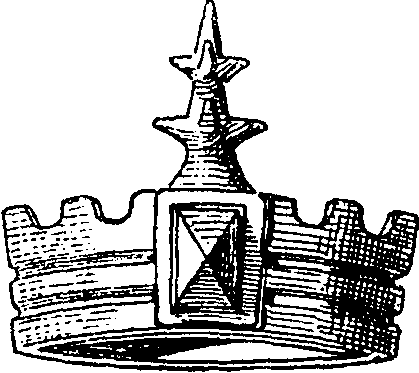 Wendische Krone im Wappen Mecklenburg-Schwerins